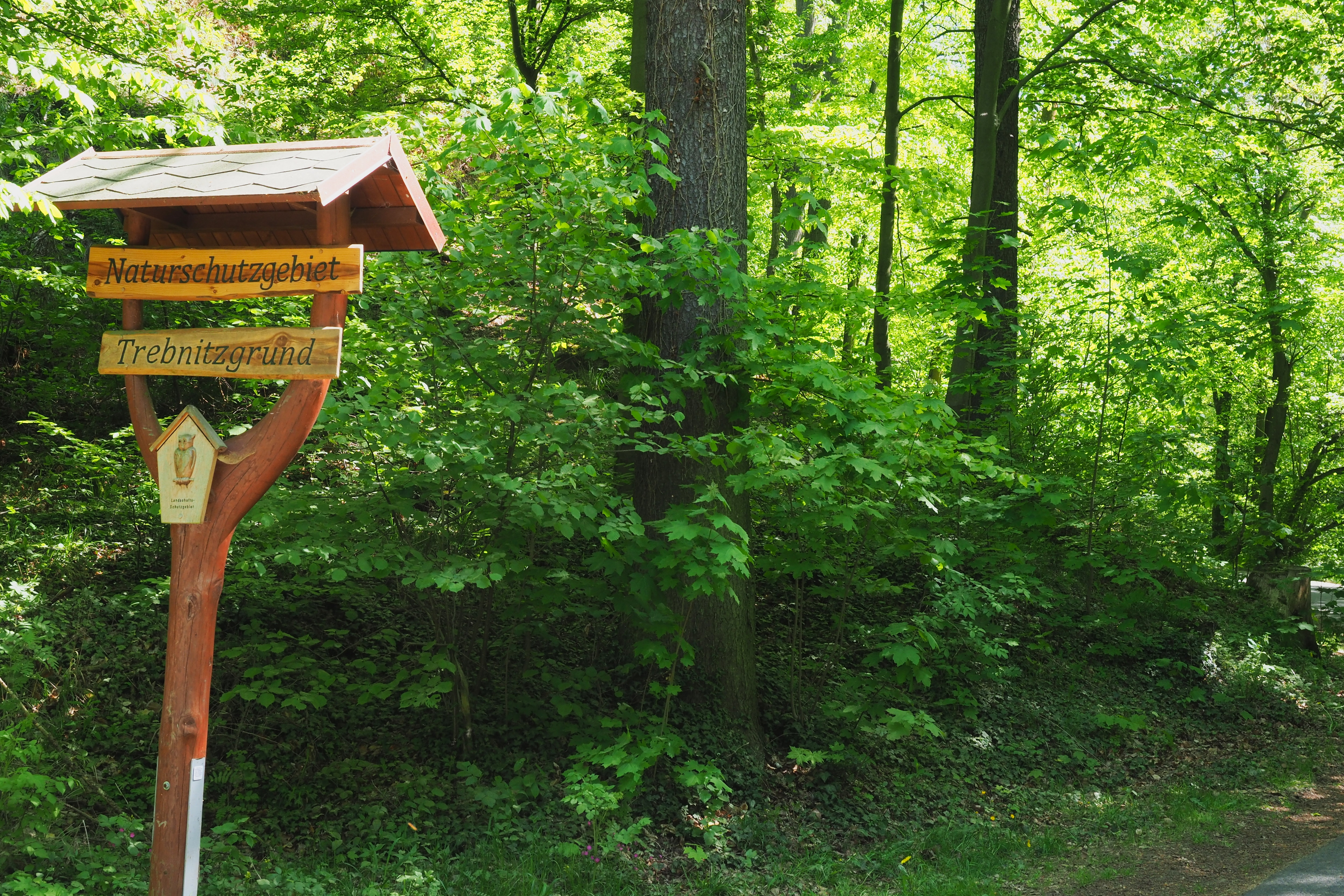 Naturschutzgebiet Trebnitzgrund bei Schlottwitz in Sachsen